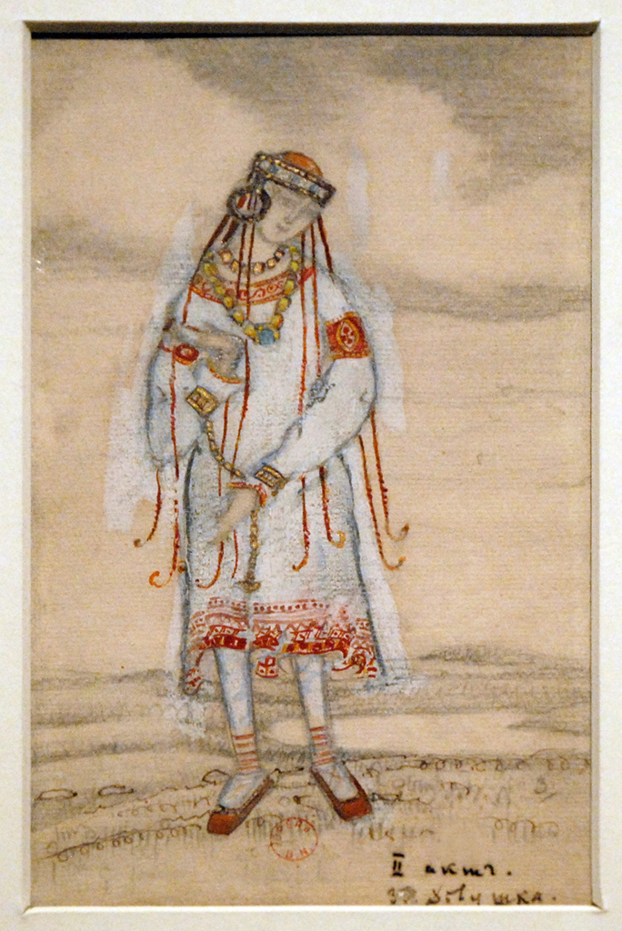 L'élue par Nicolas Roerich maquette de costume pour le Sacre du printemps Dessin à la gouache, au crayon et à l'encre Le Sacre du printemps est un ballet de Vaslav Nijinsky Musique d'Igor Stravinsky Ballets russes de Serge Diaghilev Création au Théâtre des Champs Elysées en 1913 photo du théâtre Exposition Ballets russes Bibliothèque-musée de l'Opéra de Paris